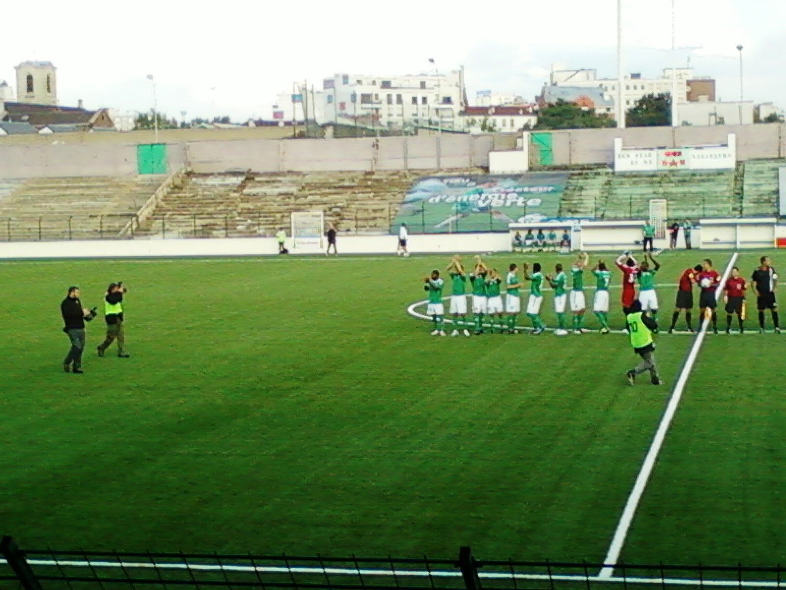 Présentation de l'équipe du Red Star lors du match de championnat National contre Fréjus Saint-Raphaël du 5 août 2011 au Stade Bauer